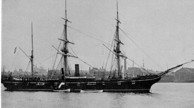 USS Kearsarge im Hafen